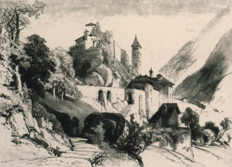 Litografia intitolata Chateau de St Pierre, Val d'Aoste di James Duffield Harding, del 1824. (Foto della litografia de L'Image, Aosta, Archivio fotografico della Soprintendenza per i Beni Culturali). Scansione: Patafisik.